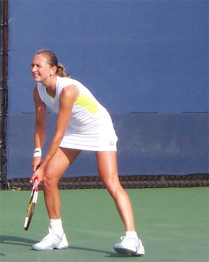 Self Made